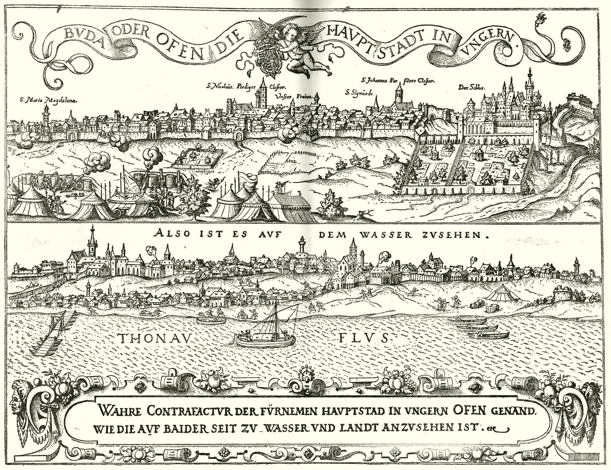 Buda 1541-ben. Siebmachernak a Meldeman-féle 1541-iki távlati kép után készült rézkarca.